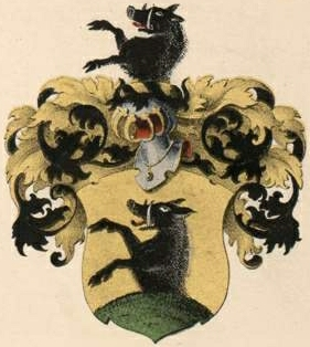 Berensi suguvõsa aadlivapp